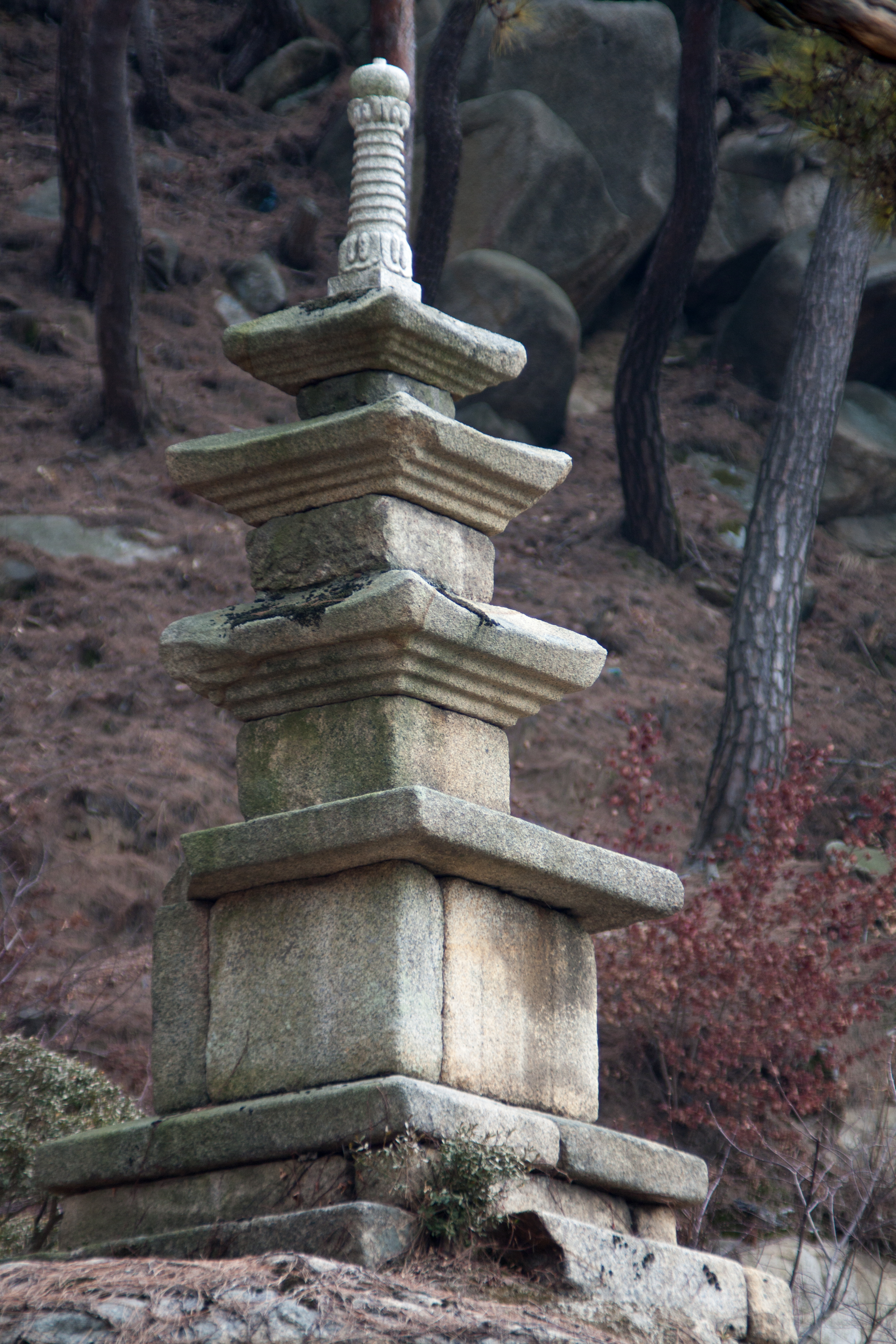 안양 삼막사 삼층석탑